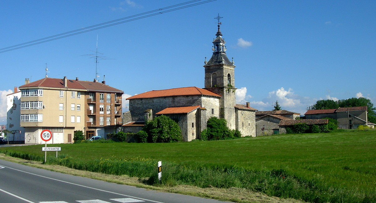 Aztegieta (Gasteiz) / Asteguieta (Vitoria)